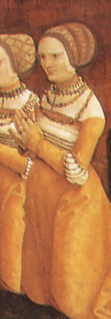 Sybille von Baden, Gattin von Philipp III. von Hanau-Lichtenberg. Ausschnitt der Votivtafel von Hans Baldung genannt Grien. Um 1509/10. Kunsthalle Karlsruhe, Inv. Nr. 88